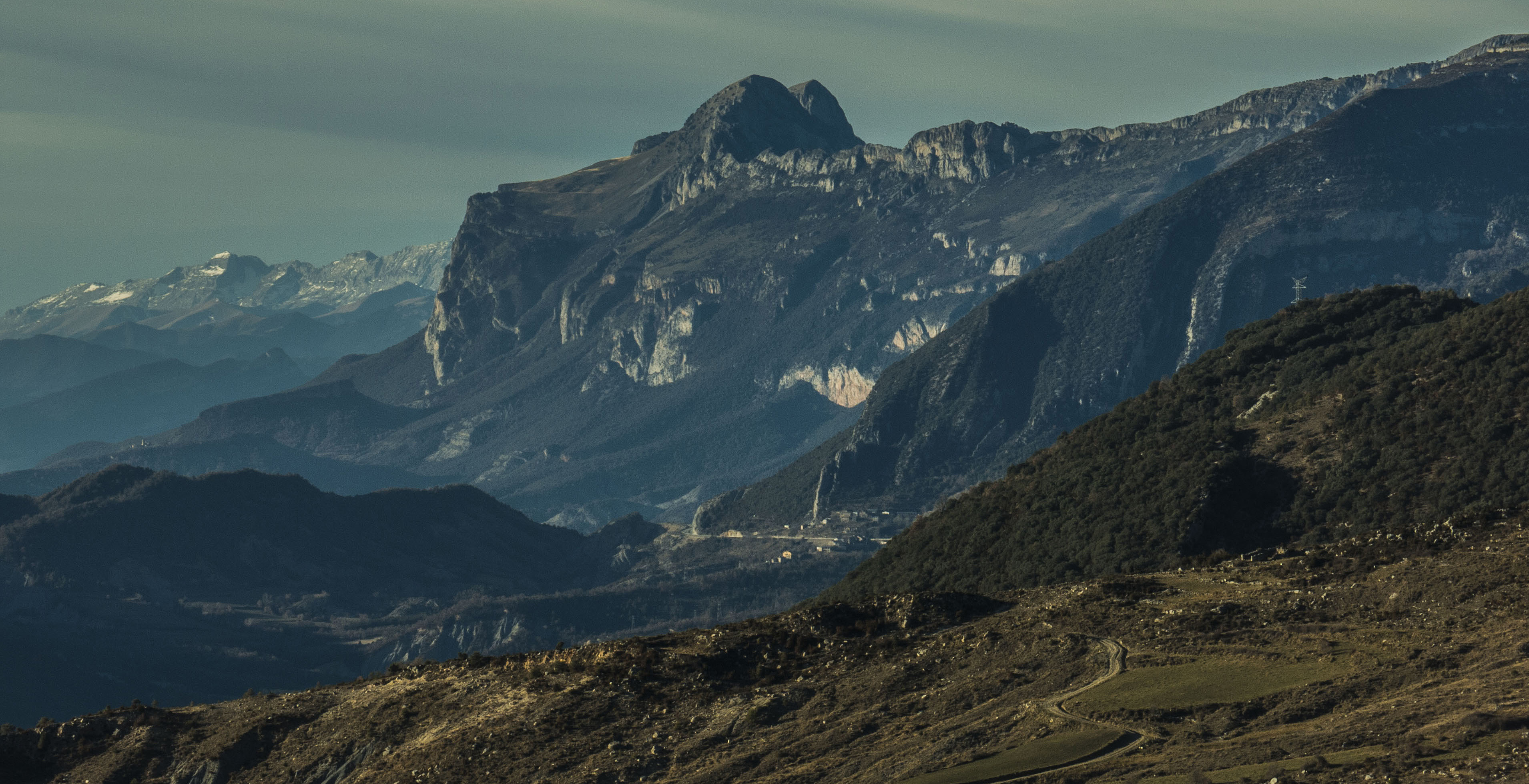 Serra d'Osca, situada entre la vall del riu Cinca i la vall de l'Éssera.